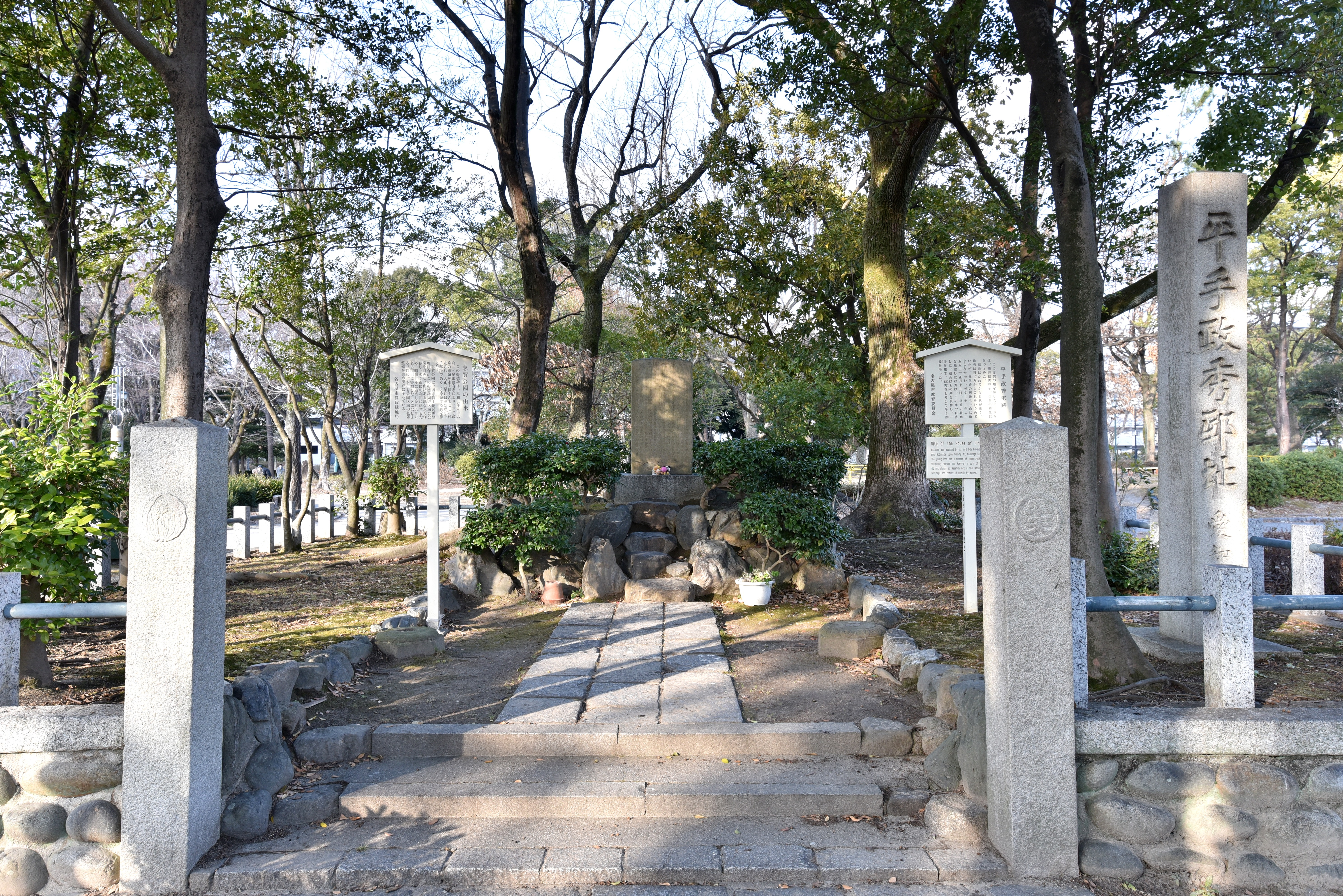 平手政秀邸址 Nikon D750